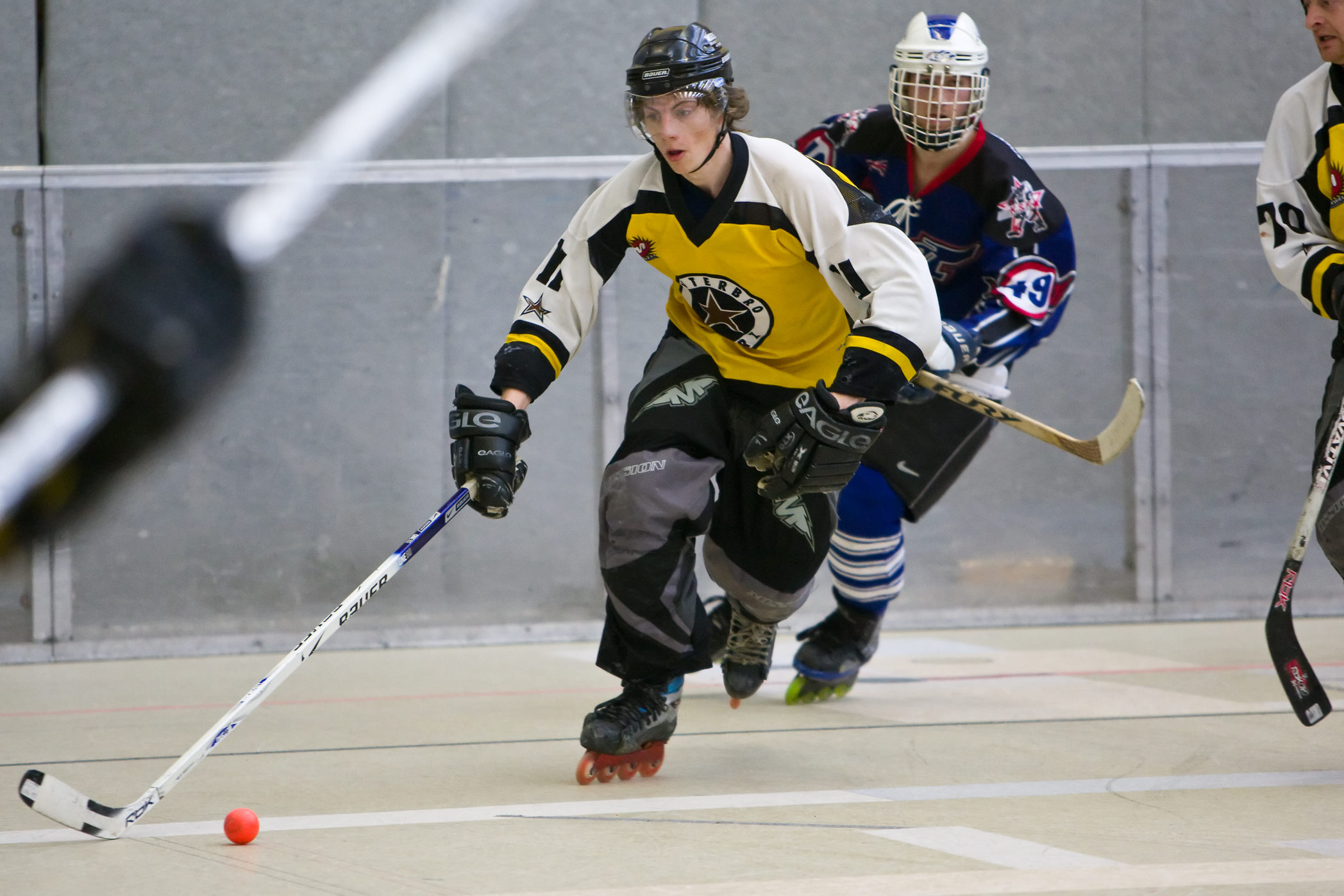 Breaksituation beim Inline-Skaterhockey (Eagle-Cup 2009)